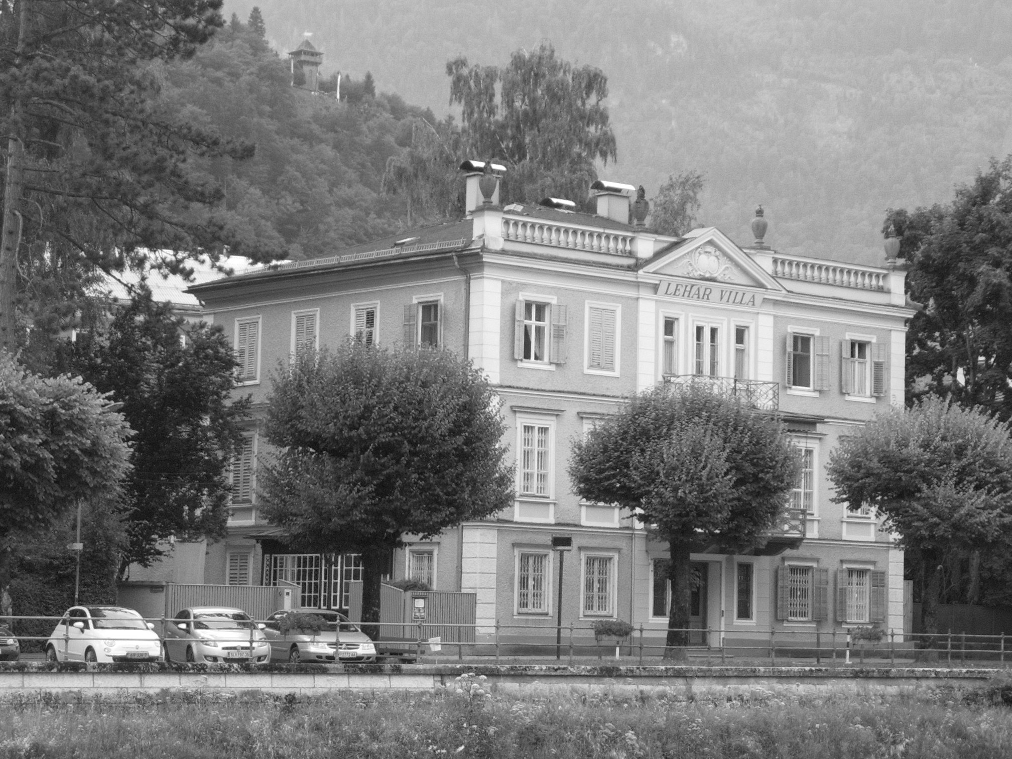 Franz-Lehár-Museum